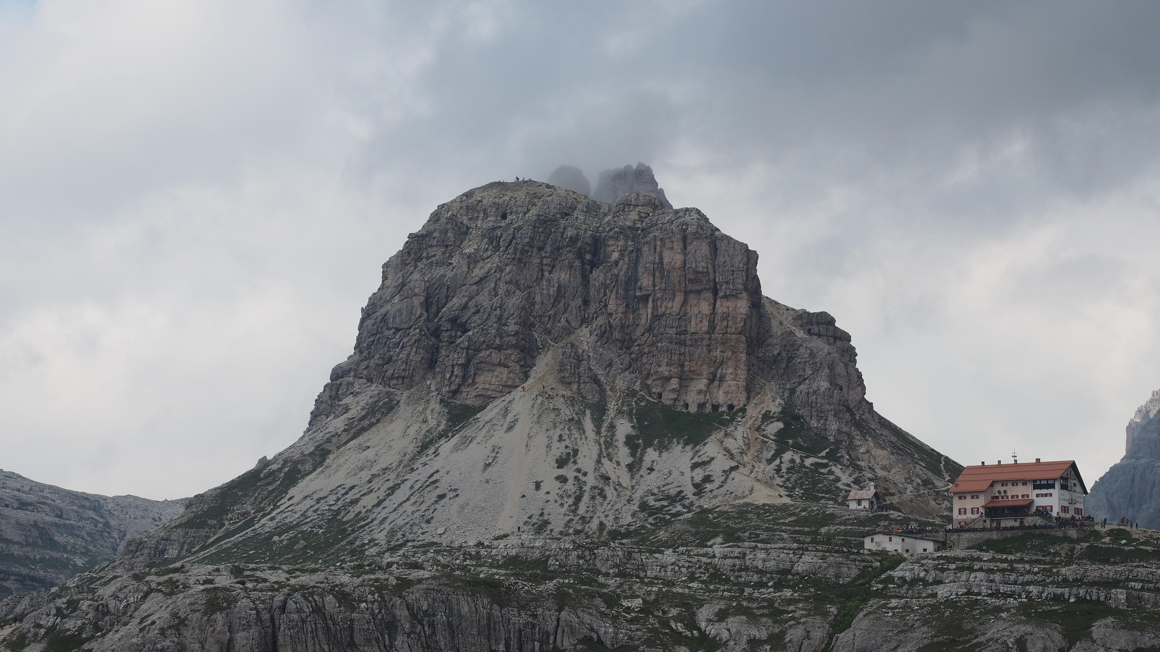 サッソ・ディ・セスト (Sasso di Sesto, 2539 m)